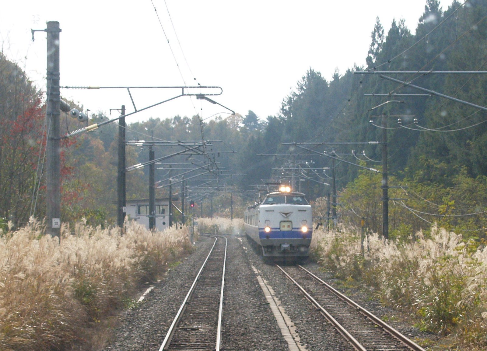 更科信号場（構内の様子。郡山行列車の先頭から撮影）